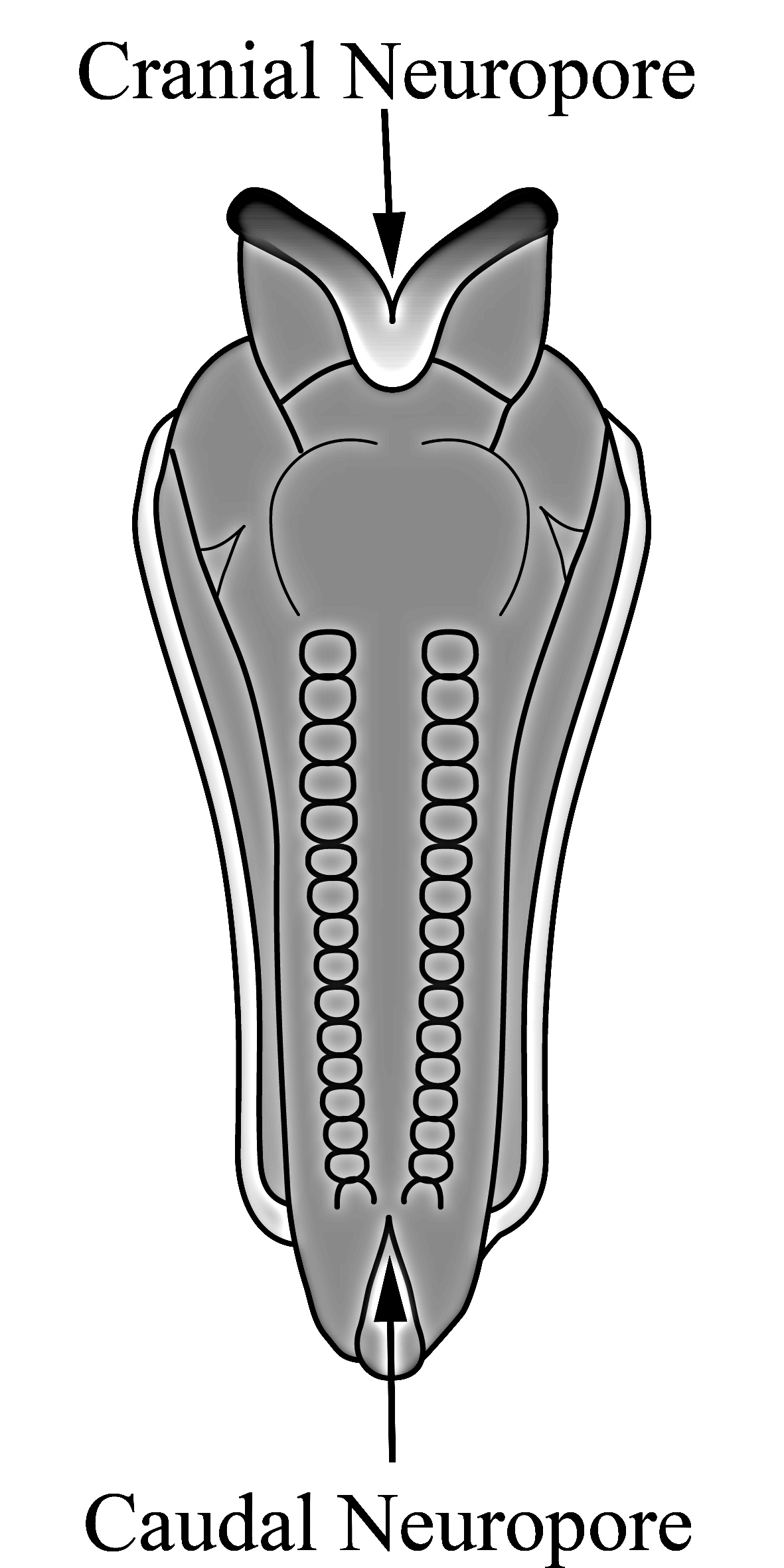 La regione centrale si chiude per prima,lasciando delle estremità aperte chiamate neuropori. Queste si chiuderanno definitivamente intorno al 28esimo giorno di vita nell'uomo.